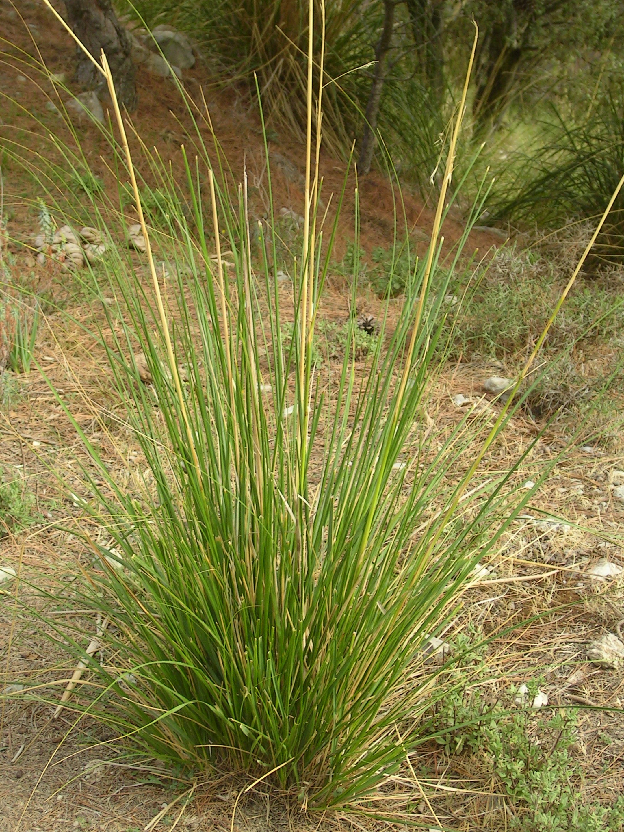 Càrritx (Ampelodesmos mauritanica). Fotografia feta prop de l'embassament de Cúber, Mallorca.